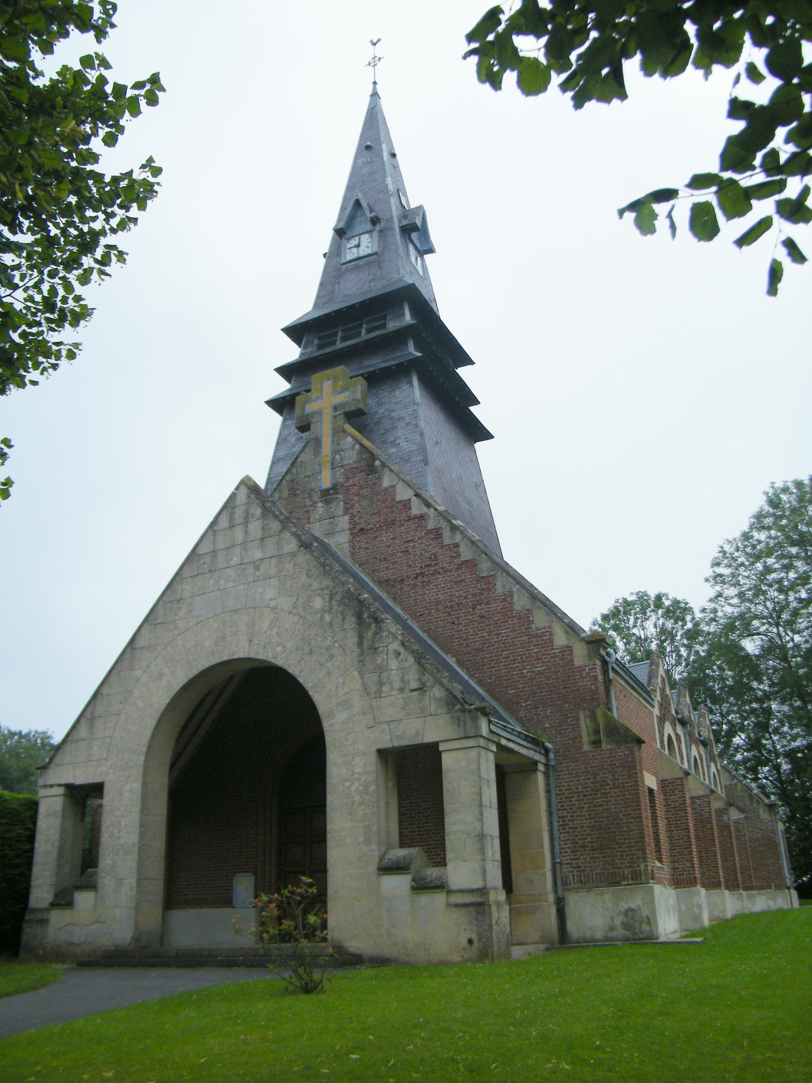 Eglise.